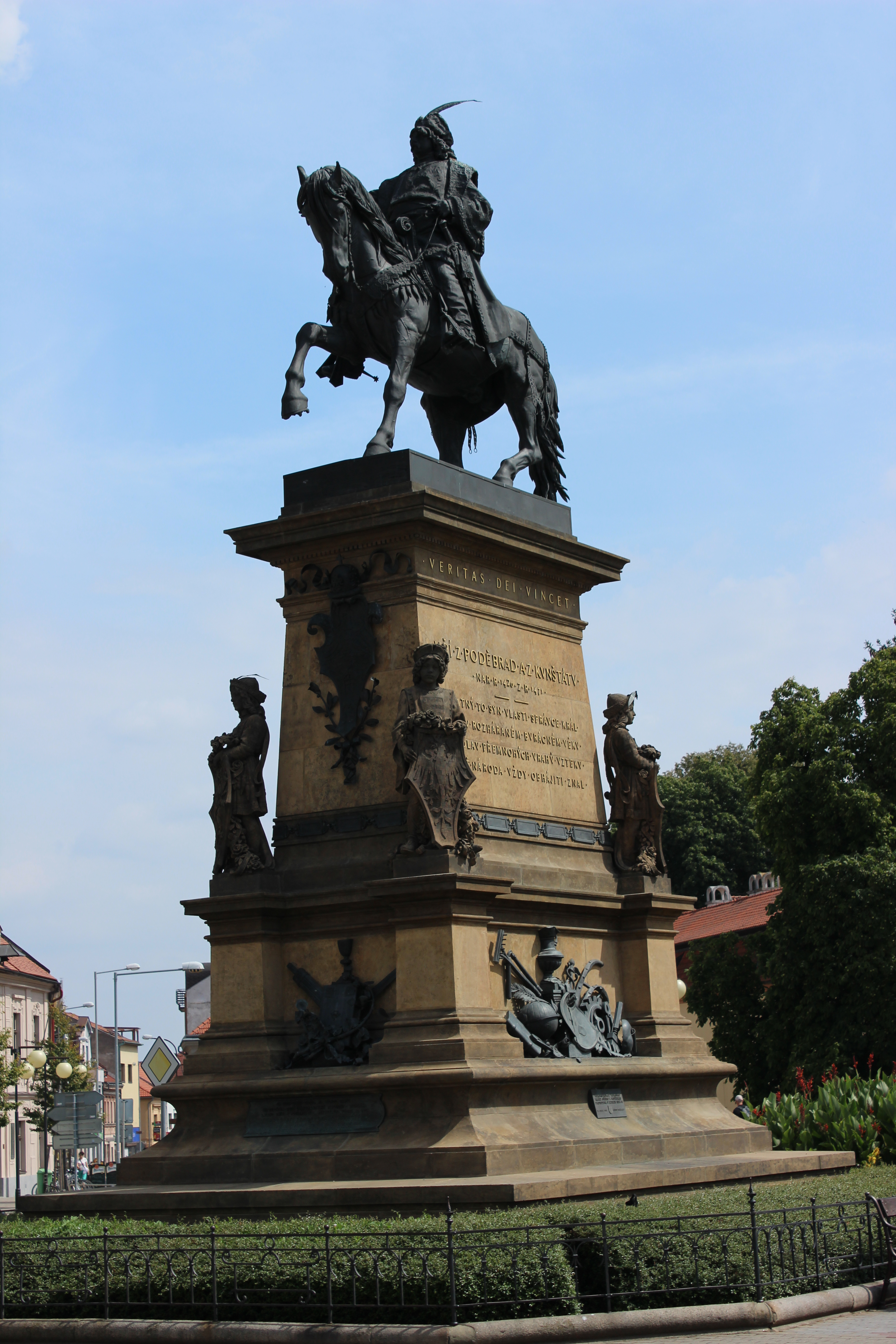 Socha krále Jiřího z Poděbrad na Jiřího náměstí v Poděbradech. Středočeský kraj. Česká republika.